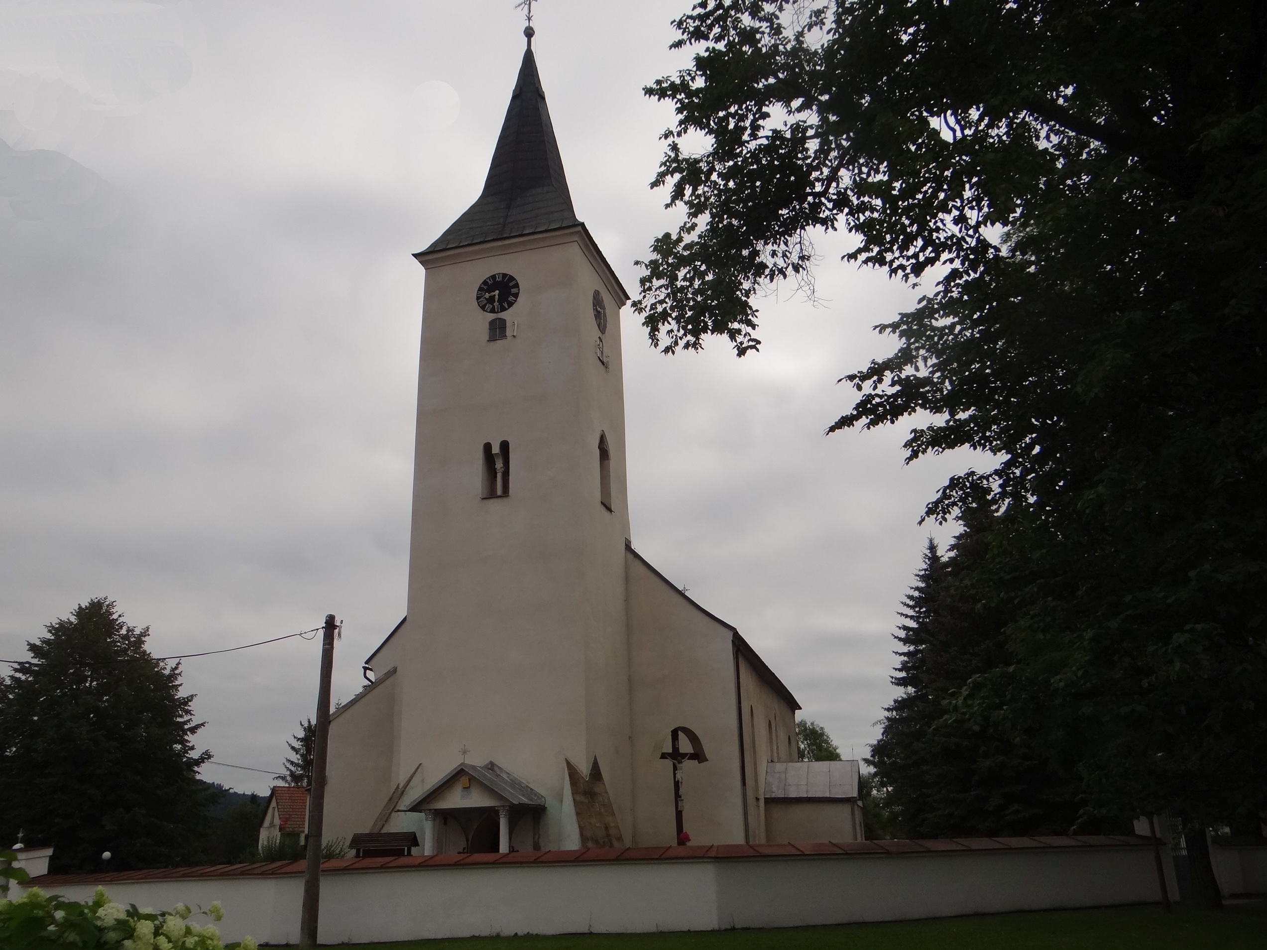 Hranovnica